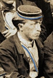 Ausschnitt aus einer Gruppenfotografie mit dem späteren Ministerialbeamten Anton Ulsamer (1842–1917)